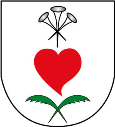 Grafika przedstawia herb wsi Zamarski w powiecie cieszyńskim (województwo śląskie).